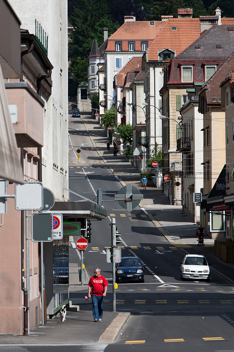 Eine der vielen ortstypischen Querstrassen von La Chaux-de-Fonds